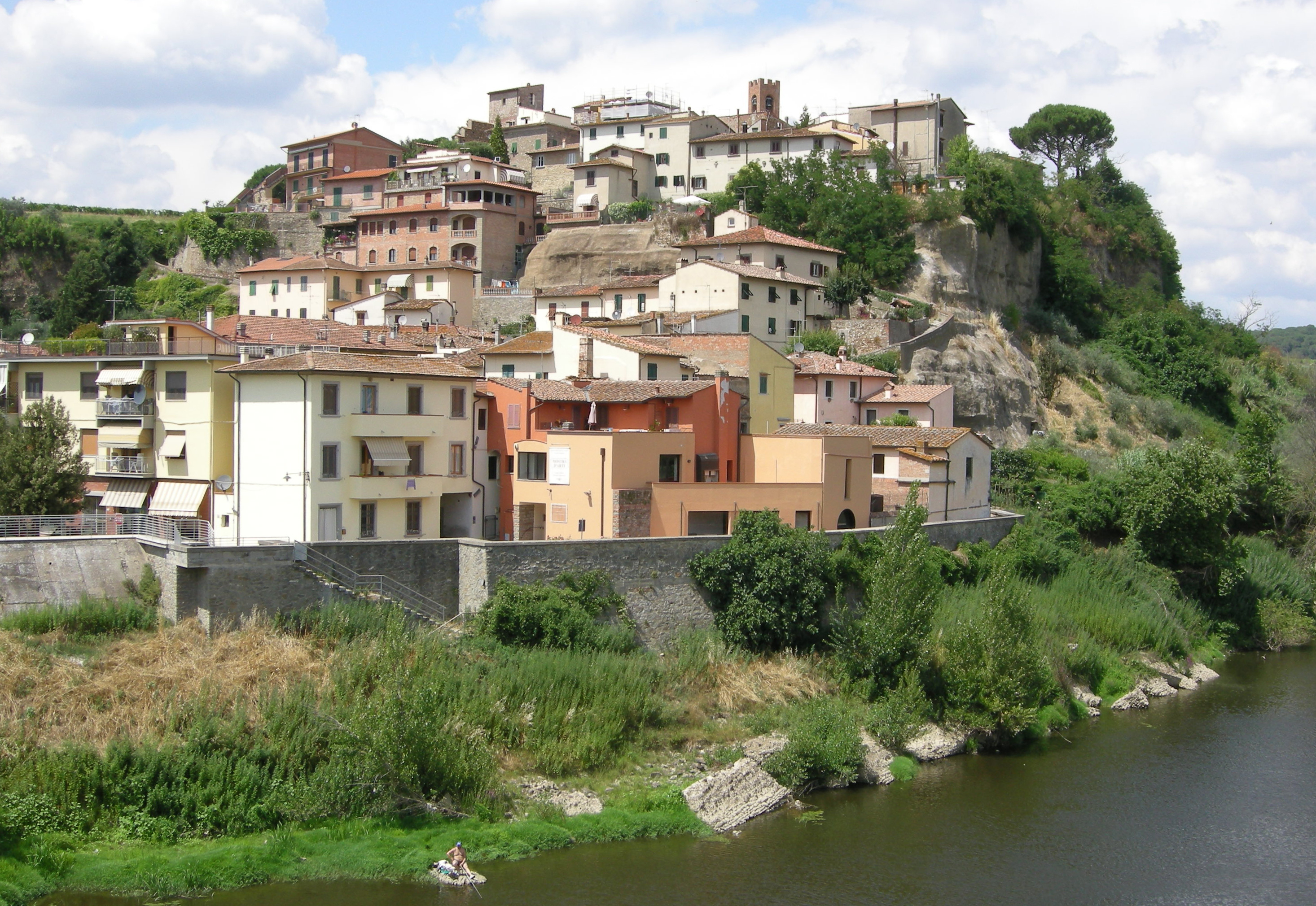 Capraia, Toscana